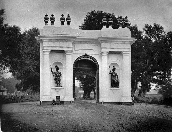 Amsterdamsche poort (Gerbang Amsterdam), disebut juga Pinangpoor (Gerbang Pinang). Bangunan ini adalah sisa peninggalan benteng VOC semasa J.P. Coen. Ketika benteng ini dibongkar pada masa Daendels, gerbang ini dipertahankan hingga berakhirnya kekuasaan Belanda di Batavia. Sepasang patung yang ada adalah patung Dewa Mars dan Dewi Minerva. Kedua patung ini raib ketika pendudukan Jepang. Selanjutnya, bangunan ini dibongkar oleh Pemerintah Indonesia pada tahun 1950 dengan dalih untuk memperlancar lalu-lintas. Tapak bangunan ini adalah di persimpangan Jalan Cengkeh (Prinsenstraat), Jalan Tongkol (Kasteelweg), dan Jalan Nelayan Timur (Amsterdamschegracht) sekarang. Dalam rencana revitalisasi Kota Tua, replika gerbang ini akan dibuat walaupun tidak diketahui apakah akan berada di tapak yang sama